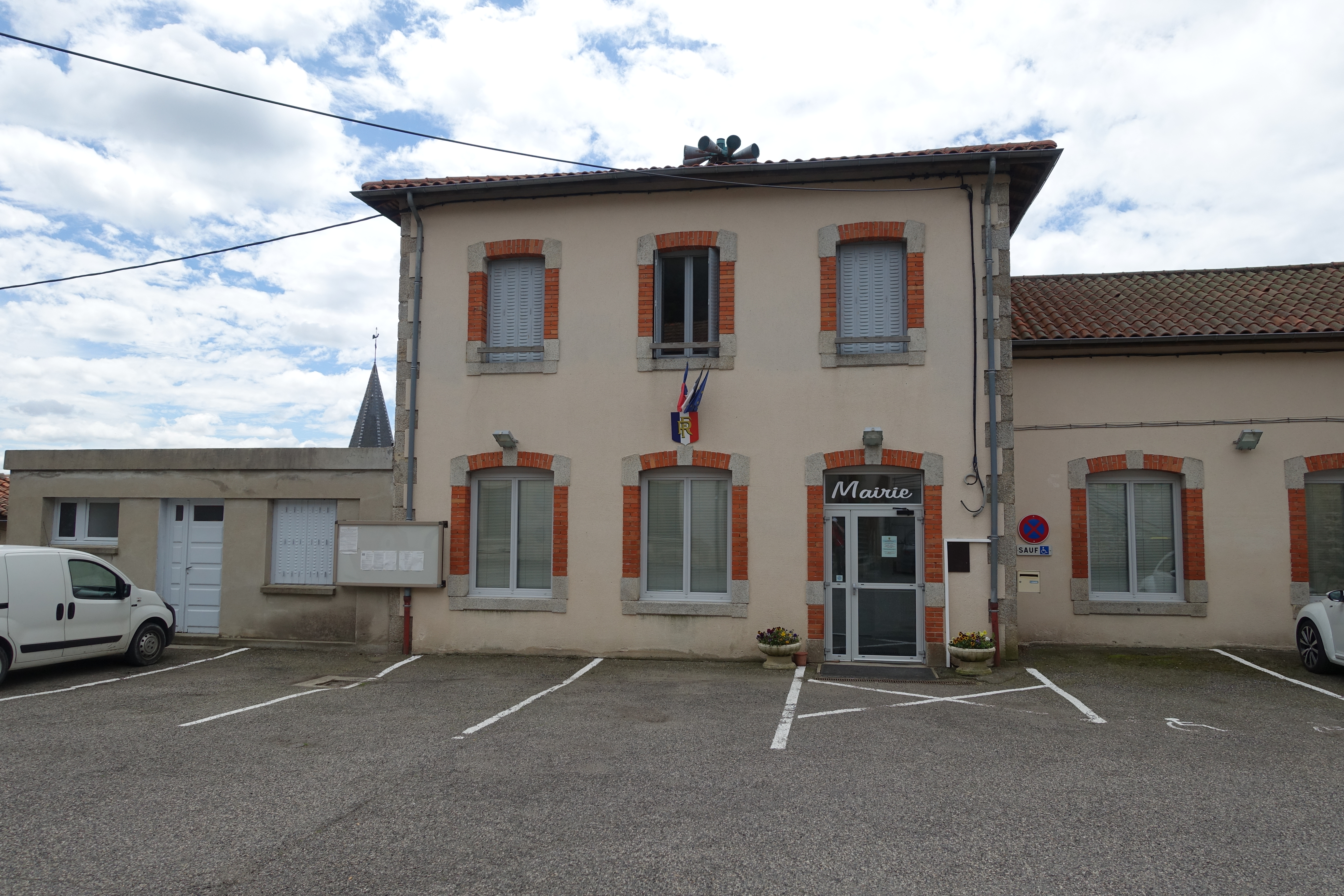 Mairie d'Arconsat